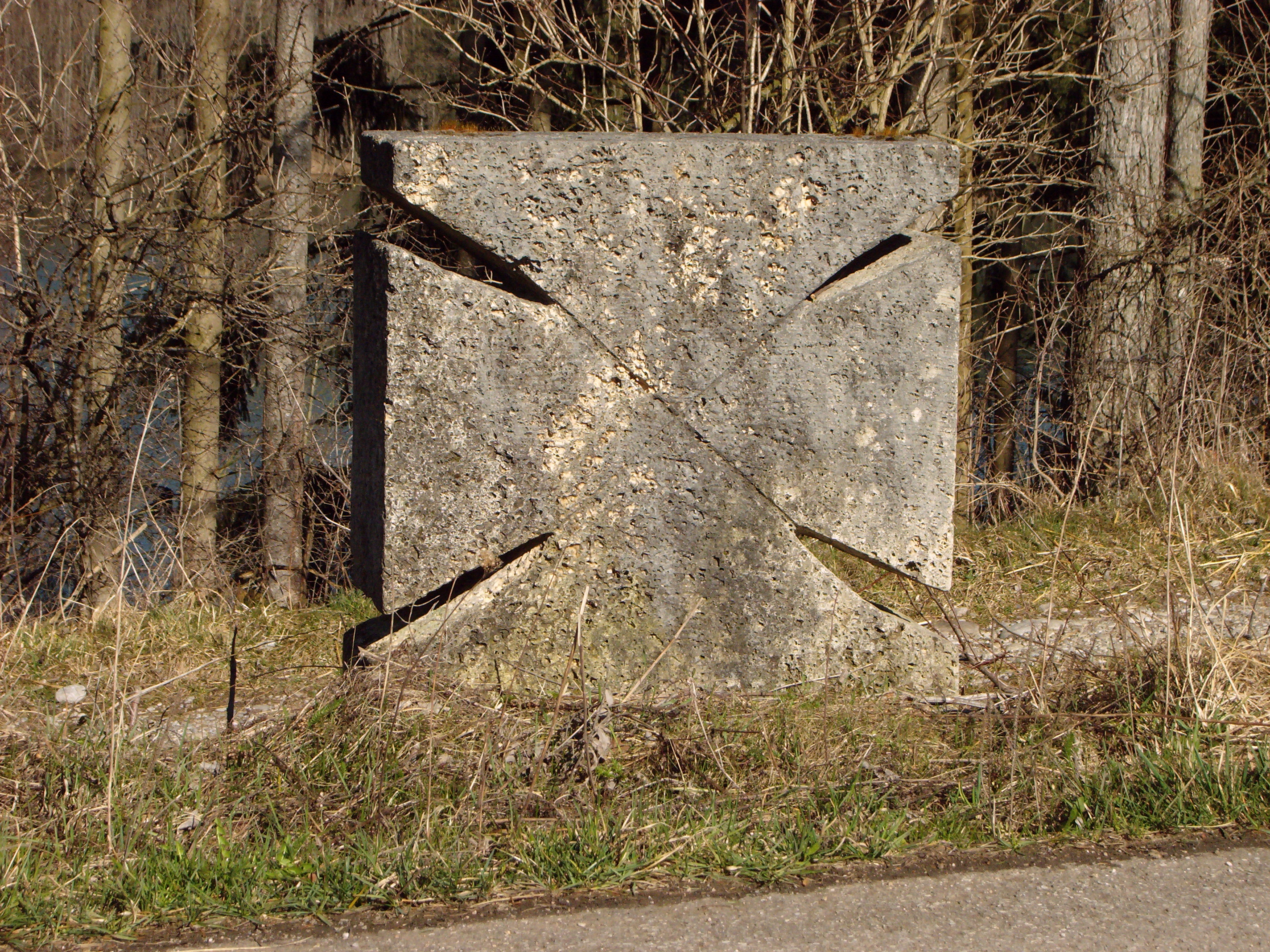 Sühnekreuz am Lechhochufer bei Epfach, Gemeinde Denklingen, Landkreis Landsberg am Lech